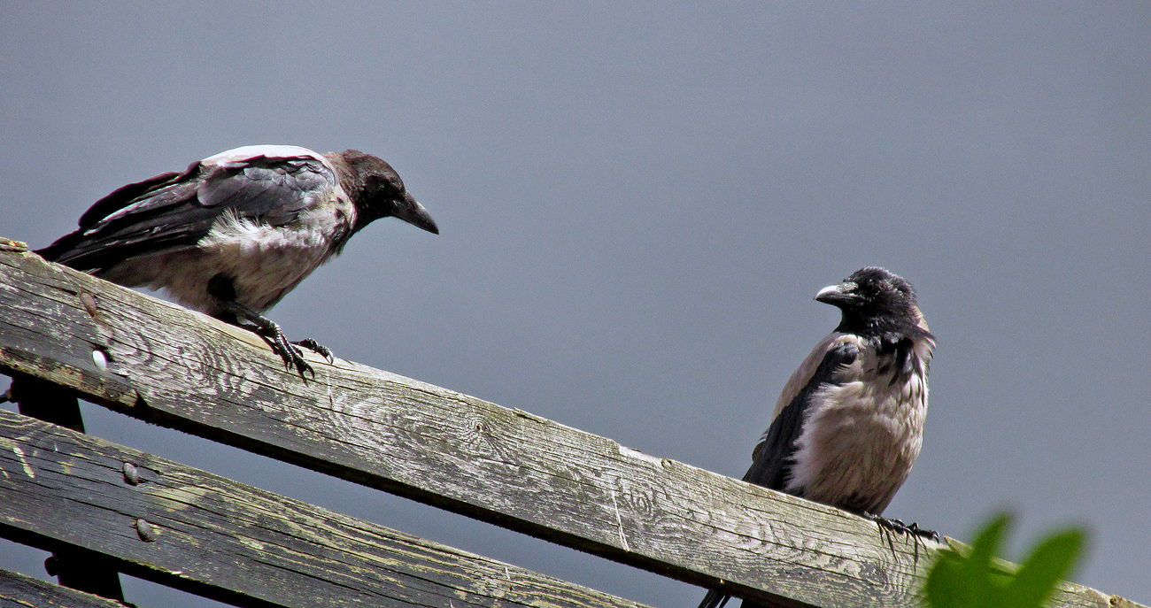 Två unga Kråkor Corvus cornix. Sverige.